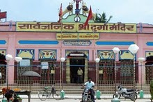 Bari Durga Mandir of Katihar.